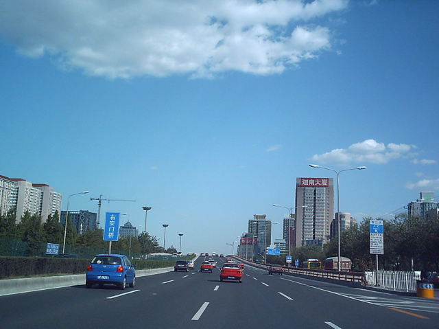 二环路 (DF08 (中文) 2004年图片)